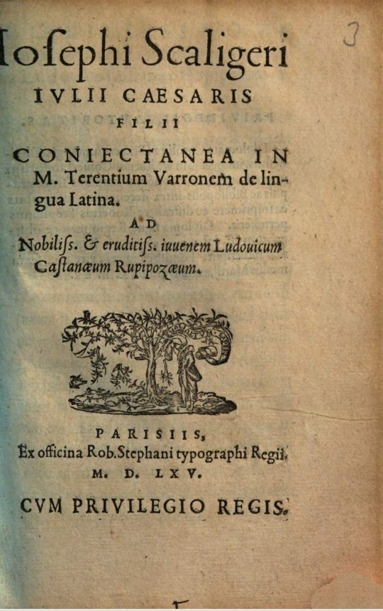 Portada de l'obra "Coniectanea in M. Terentium Varronem De lingua Latina" de Marc Terenci Varró, traduïda per Joseph Juste Scaliger. Parisiis: Ex officina Rob. Stephani typographi regii, 1565.